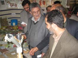 آفای مهندس ابوالقاسم رحمانی